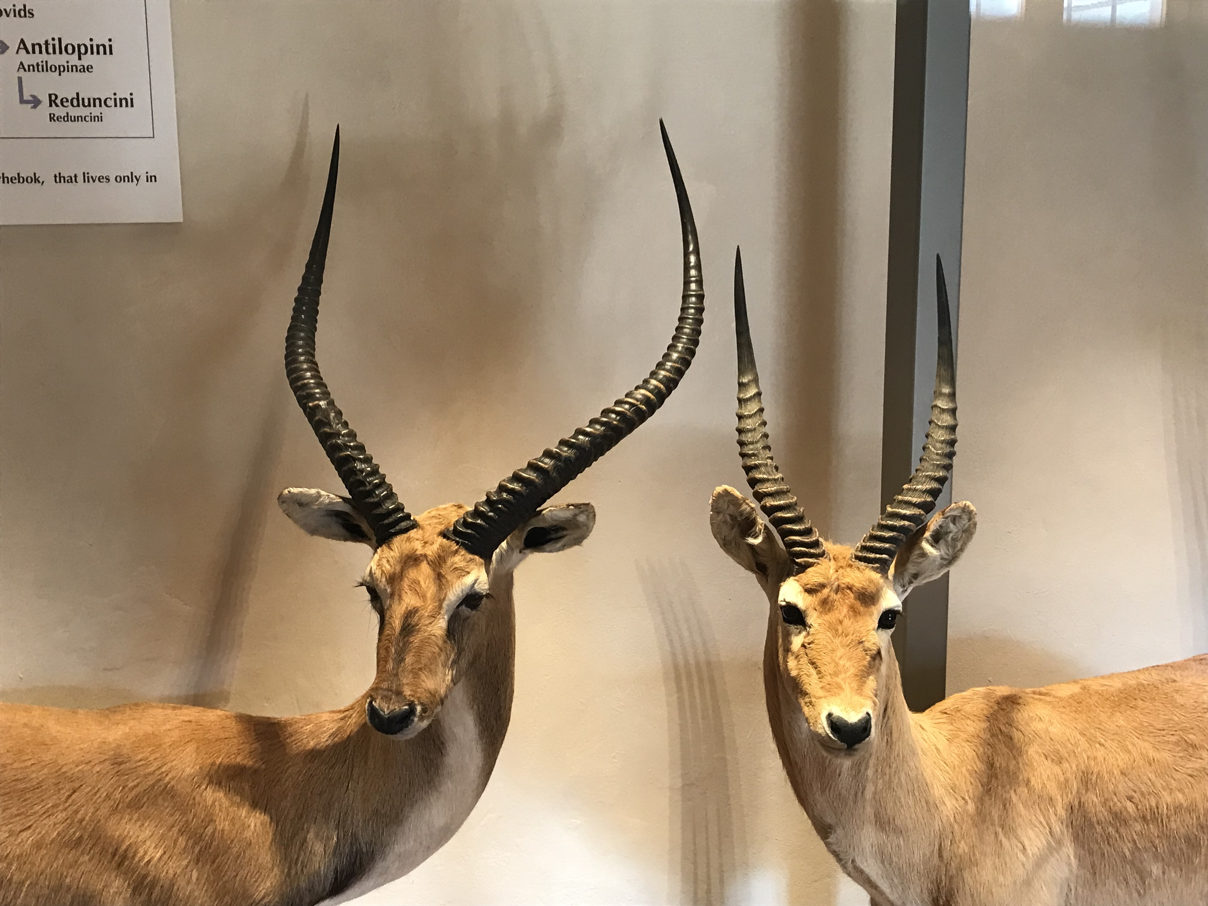 Un Lichi (Kobus leche a sinistra) e un Puku (Kobus vardonii a destra) nella nuova Galleria dei mammiferi al Museo di Storia naturale dell'Università di Pisa. Entrambi provenienti dalla Collezione Barbero.